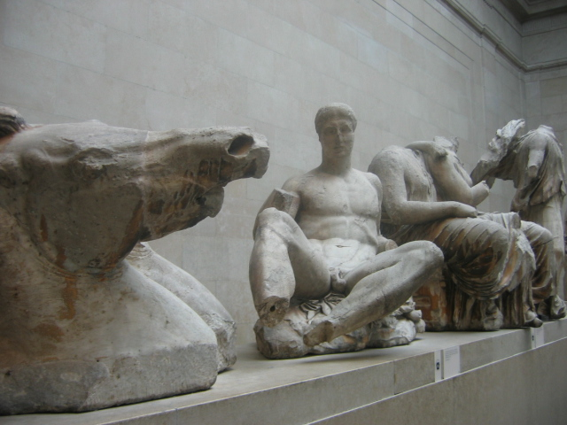 Elgin Marbles, British Museum, London : détail du fronton est